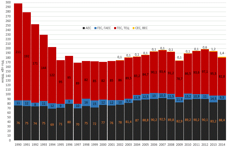 Структура виробництва електроенергії в Україні